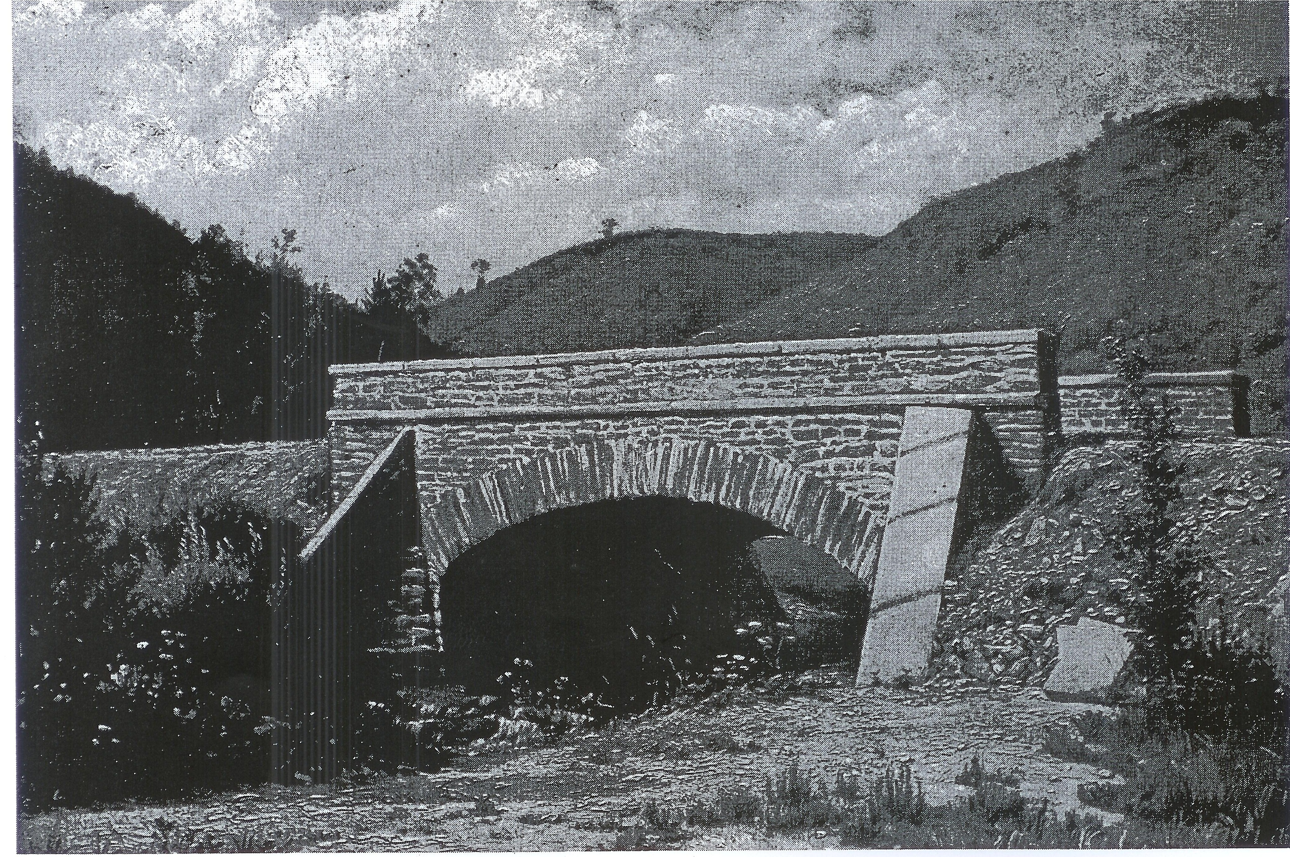 Luxembourgish: D'Schoofsbréck iwwer d'Waark